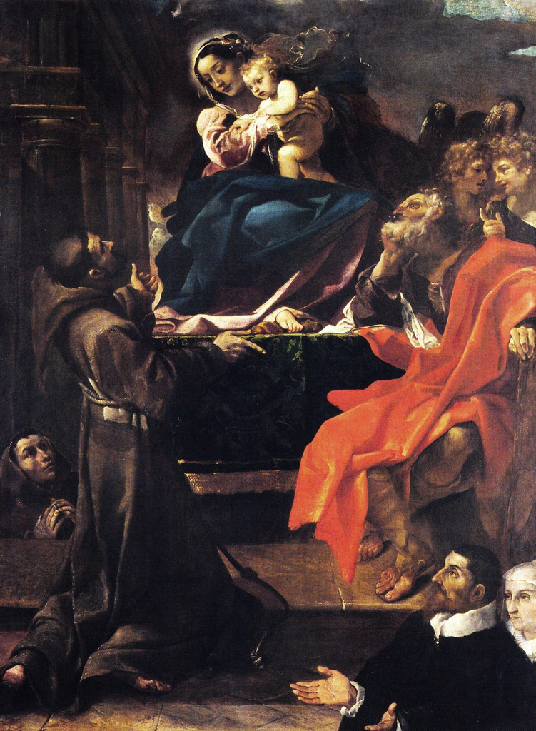 Madonna col Bambino, i santi Giuseppe, Francesco e due committenti Alternative title(s): La Carraccina